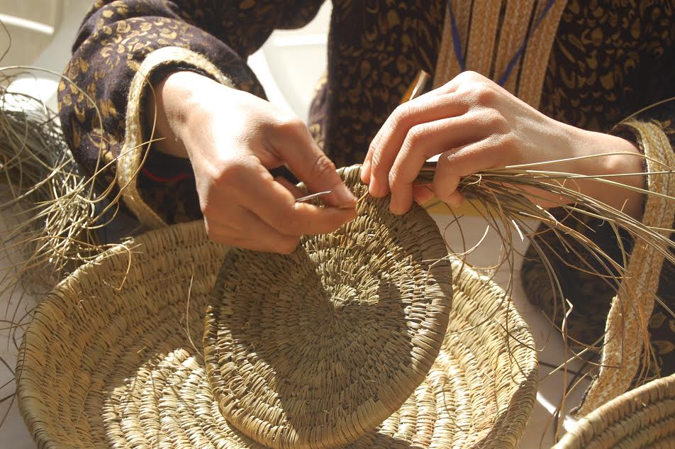 l'art